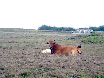 臺灣澎湖縣湖西鄉常見的牧牛景像，多位於墓地附近。